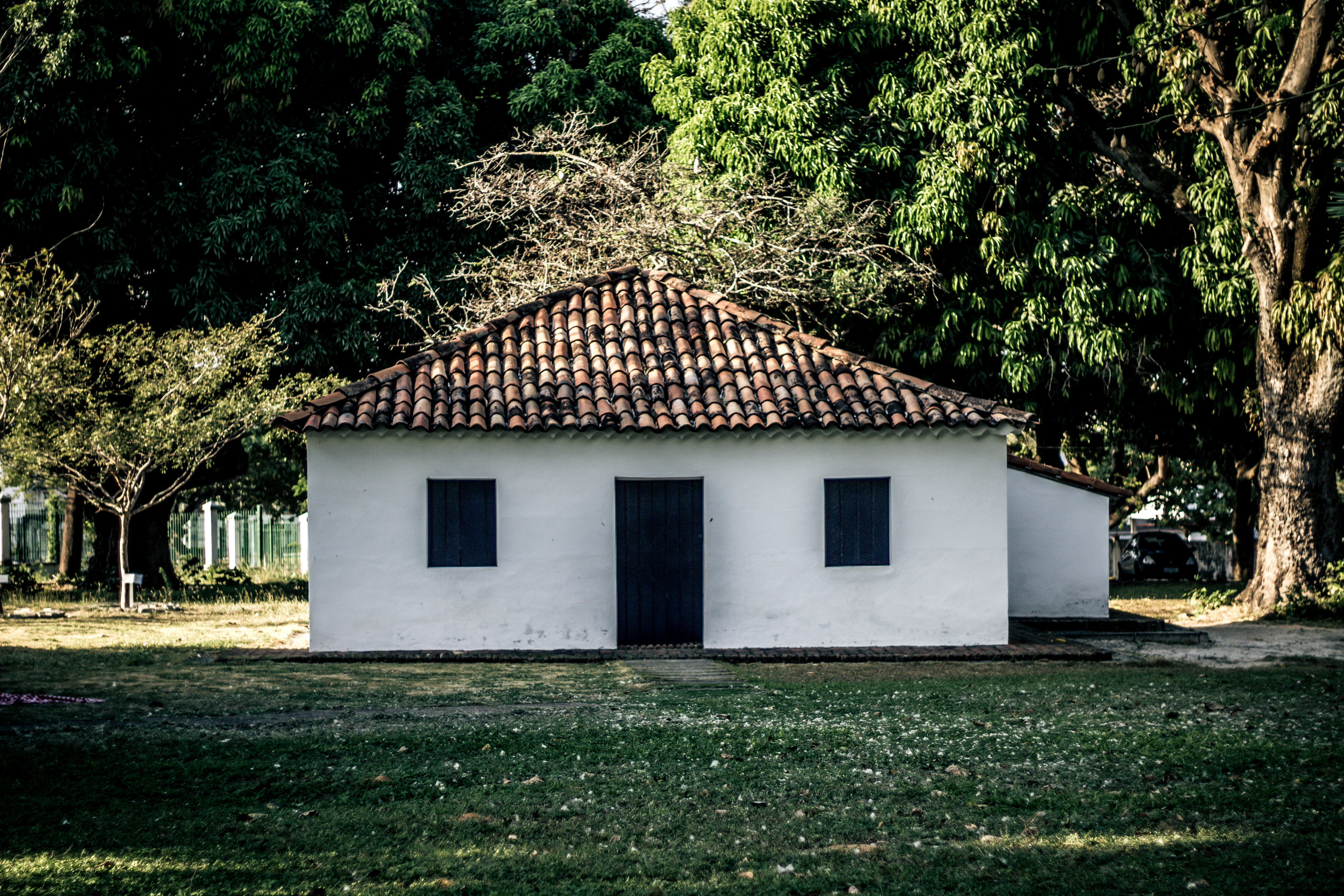 Casa natal de José de Alencar